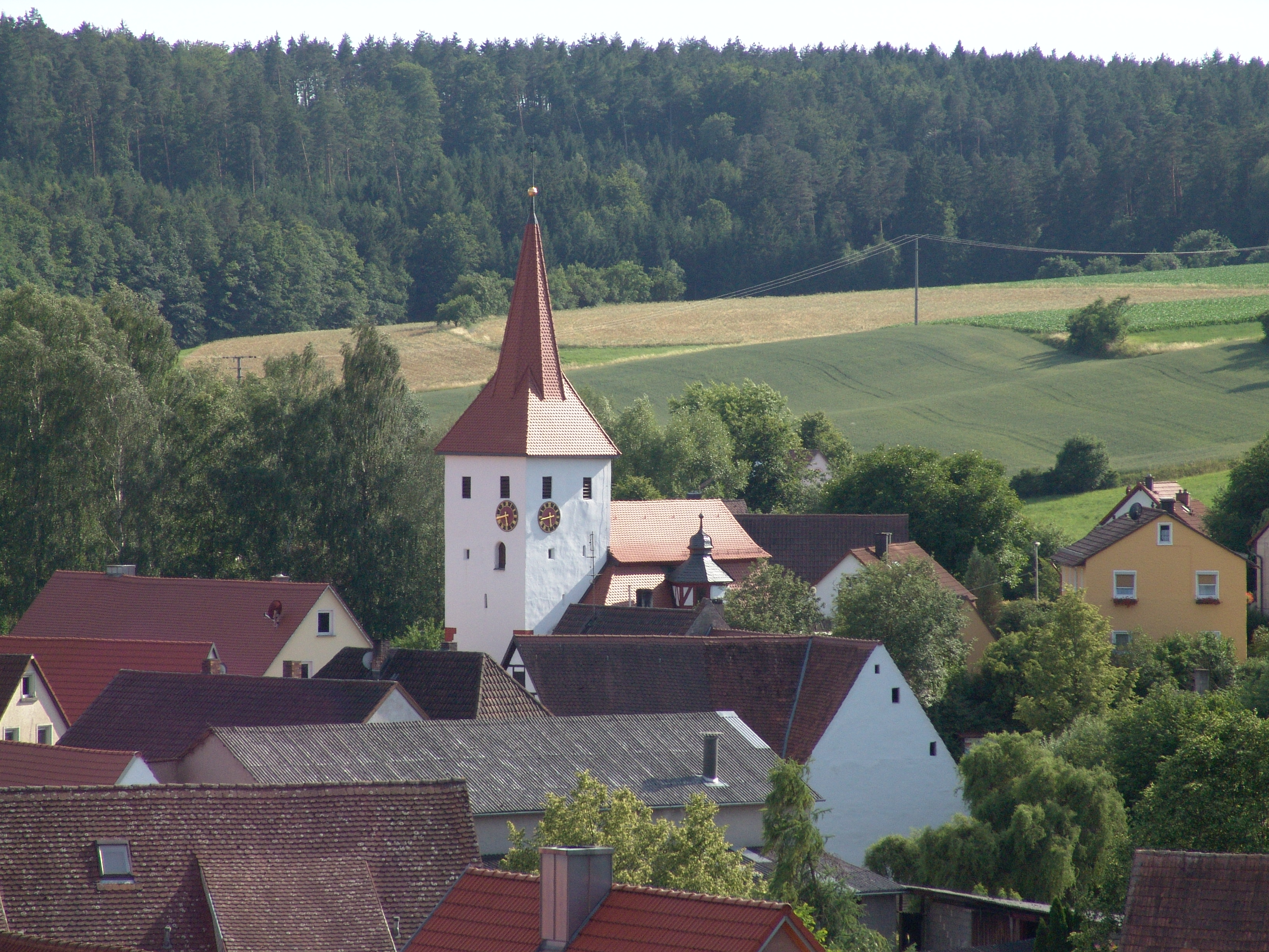 Markt Taschendorf Evangelische Kirche